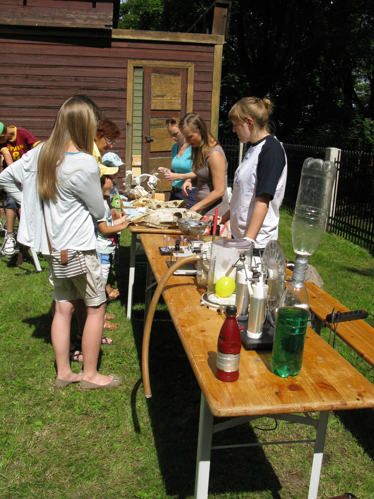 Teadusbussi katseseadeldised Tartu tähetorni juures Toomemäel Tartu hansapäevadel, 20. juuli 2012. Foto: Oop.